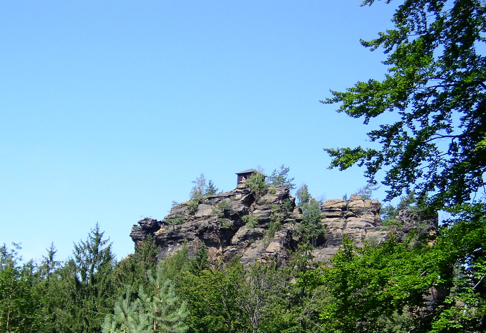 Der Rudolfstein in der Bömischen Schweiz